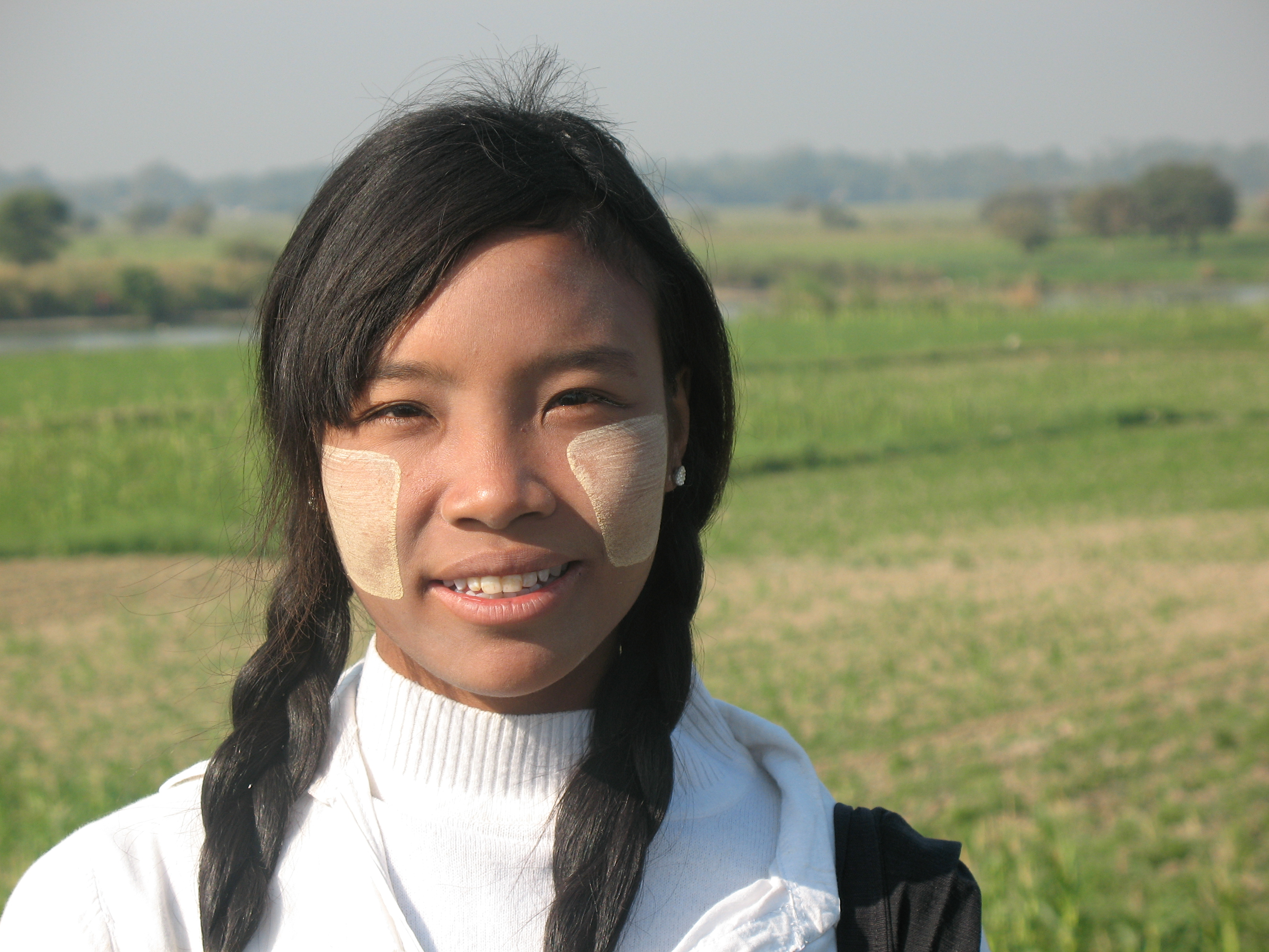 Burmise girl